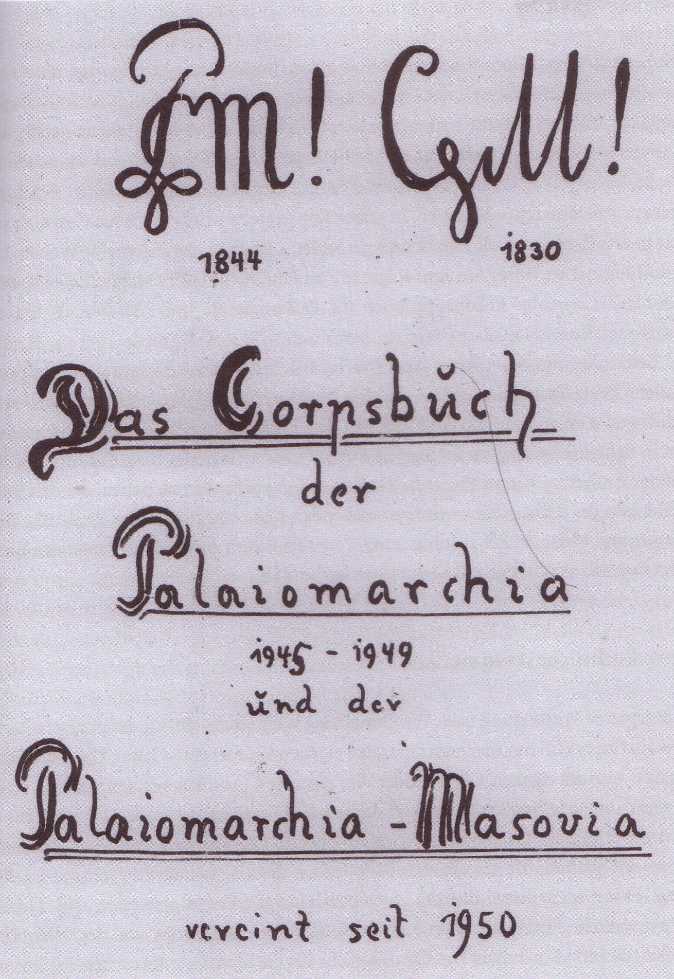 Titelblatt des handschriftlichen Corpsbuches von Palaiomarchia-Masovia